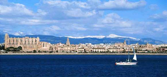 Palma Skyline